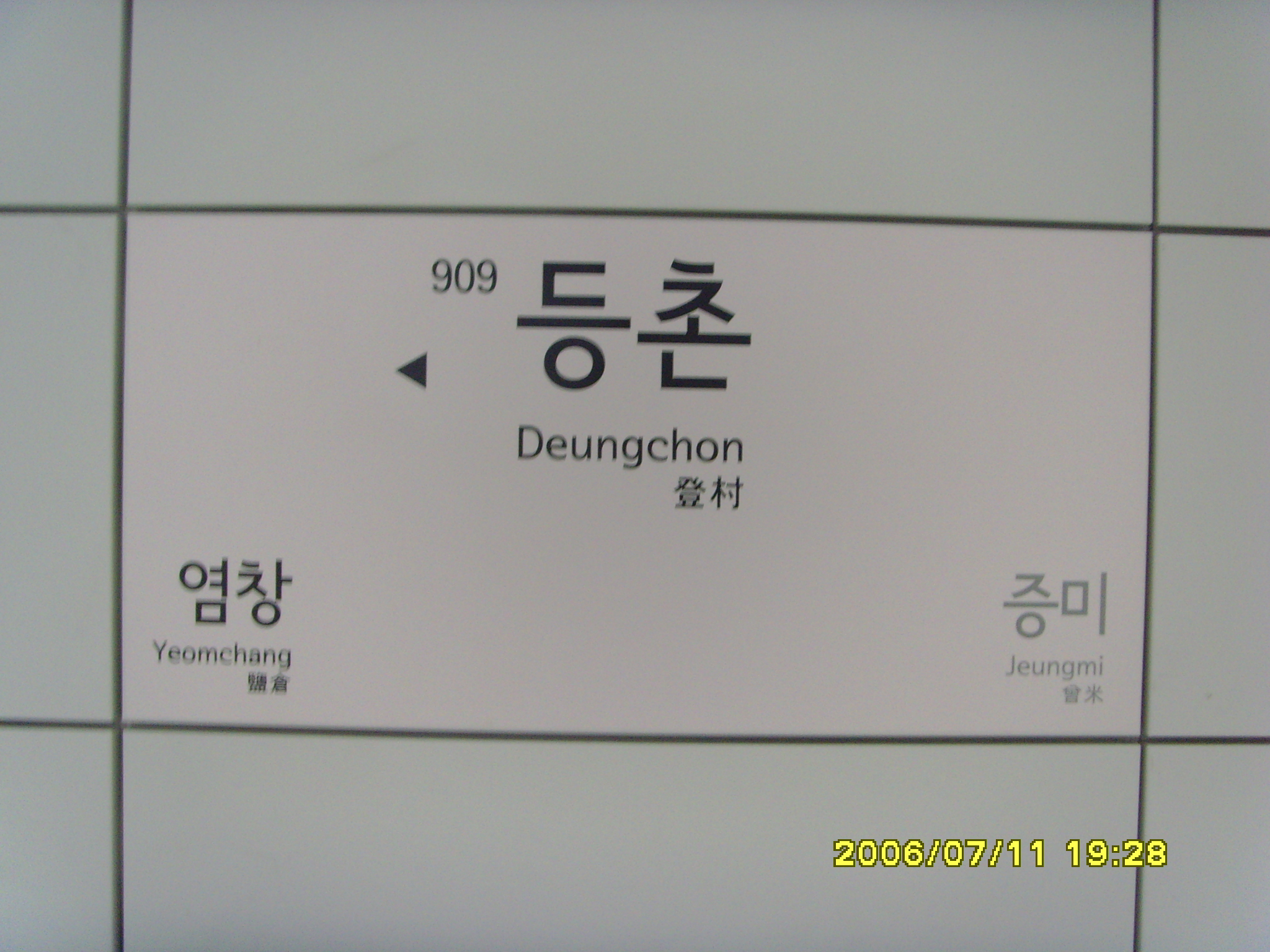 ソウル地下鉄9号線登村駅 駅名標